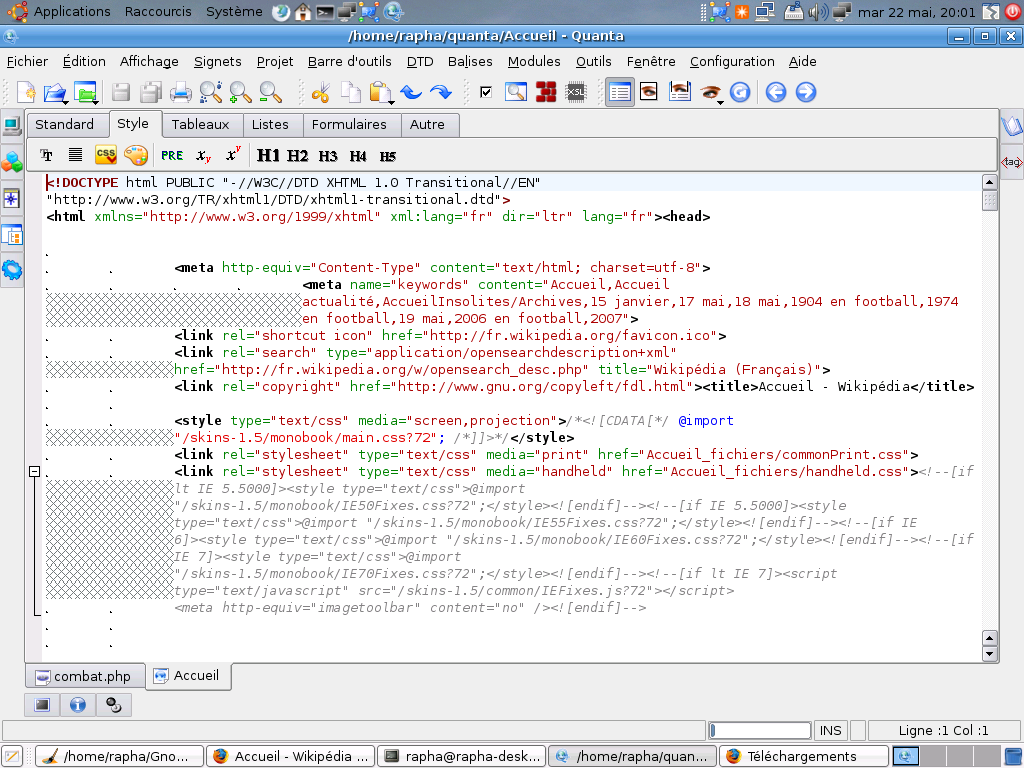 Quanta sur Ubuntu Feisty Fawn